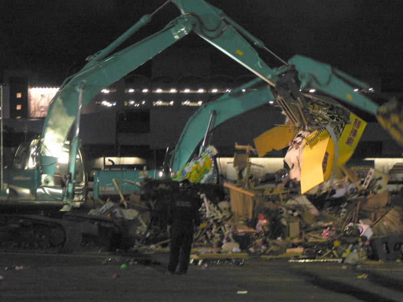 2010年の精霊流し。尾上流し場で、重機によって解体される精霊船。